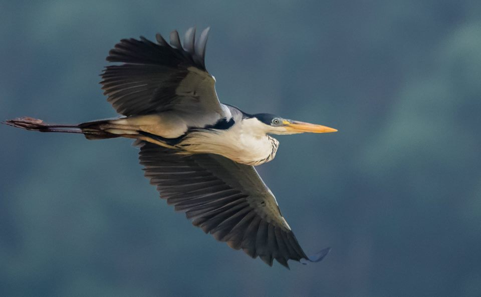 Garça-moura ou Maguary